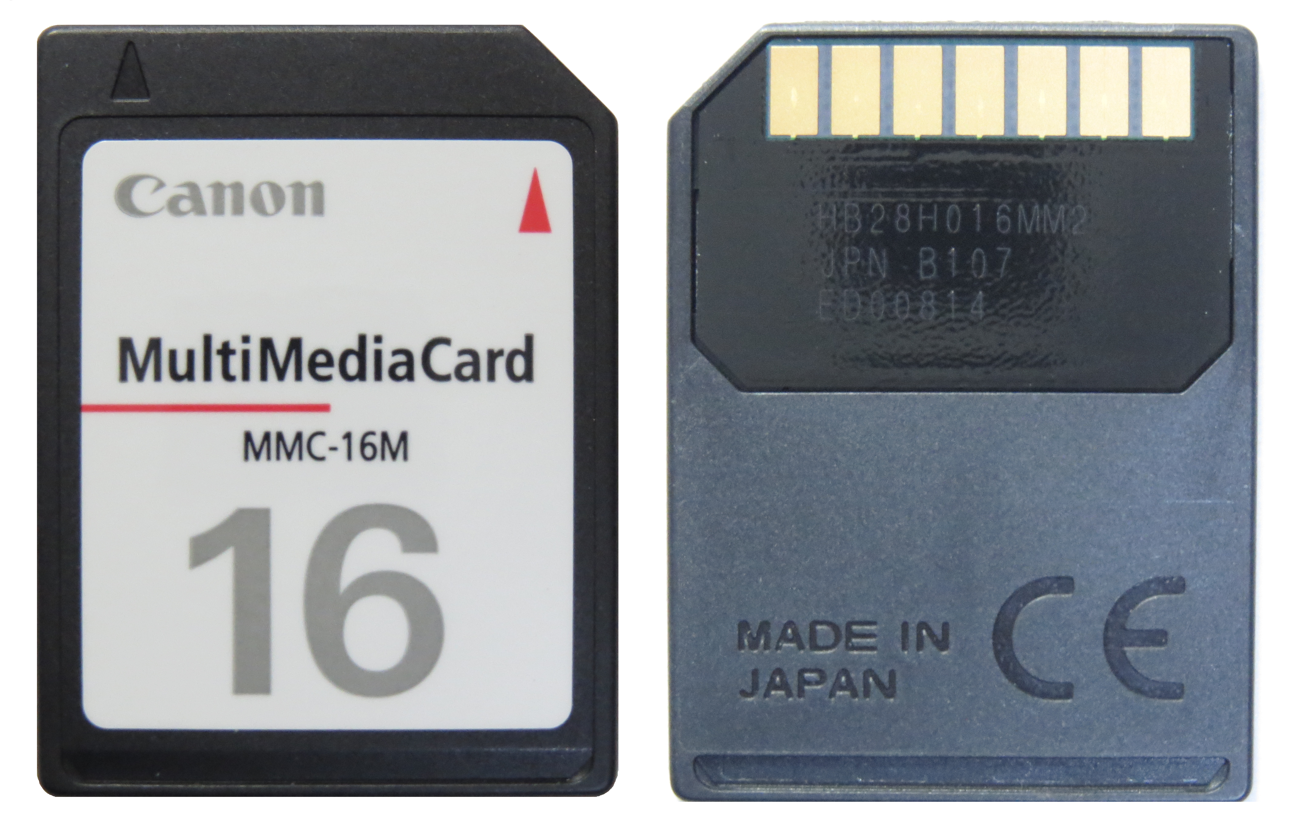 Canon Multi Media Card 16MB